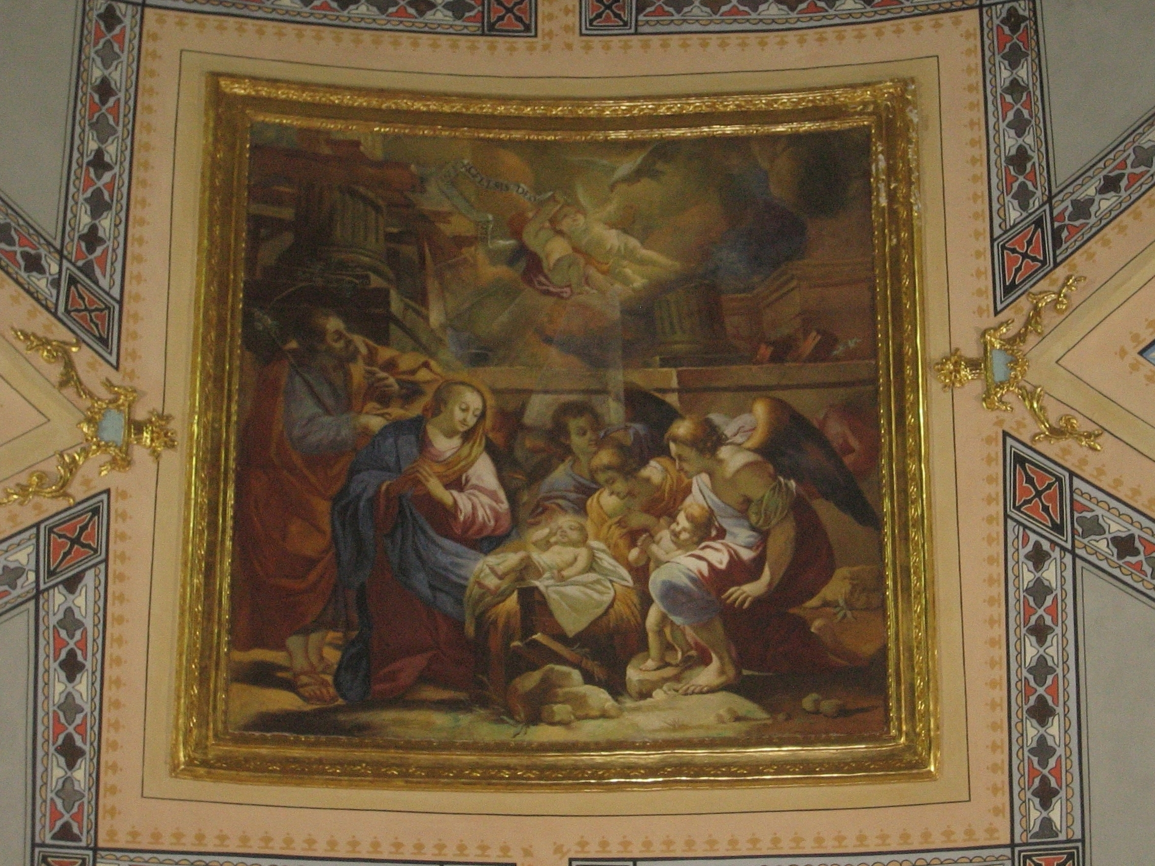 El Naixement de Jesús, de Joaquim Oliet, pintura al fresc a la volta de l'ermita de la Mare de Déu de la Misericòrdia i Sant Sebastià de Vinaròs (Baix Maestrat)